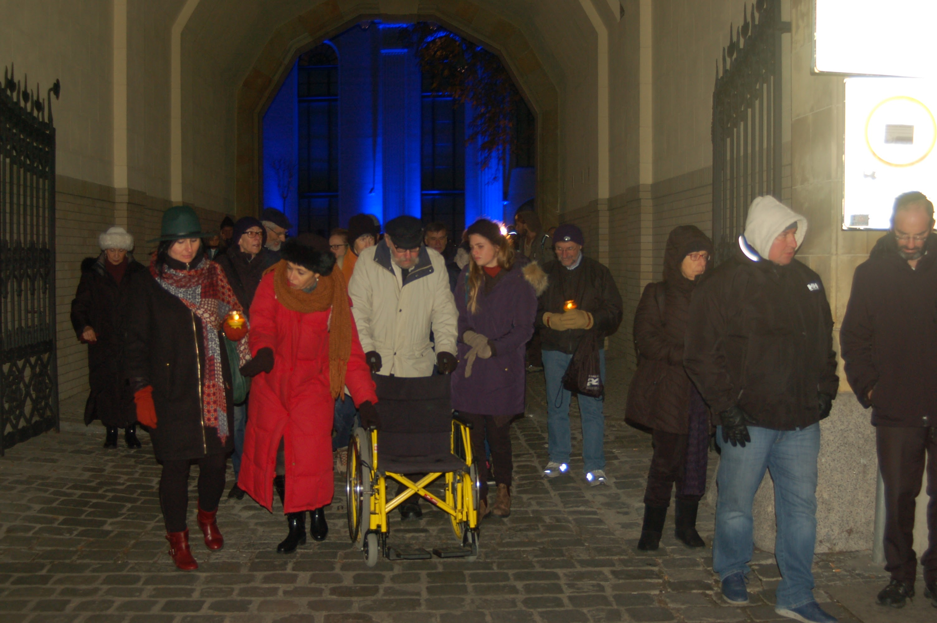 צעדת החיים ב-9 בנובמבר, אירועי הזיכרון לליל הבדולח, ברסלאו